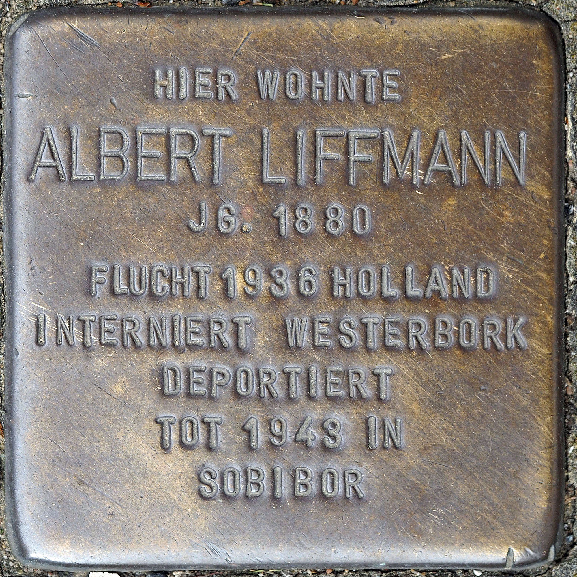 Stolpersteine MG: Liffmann, Albert